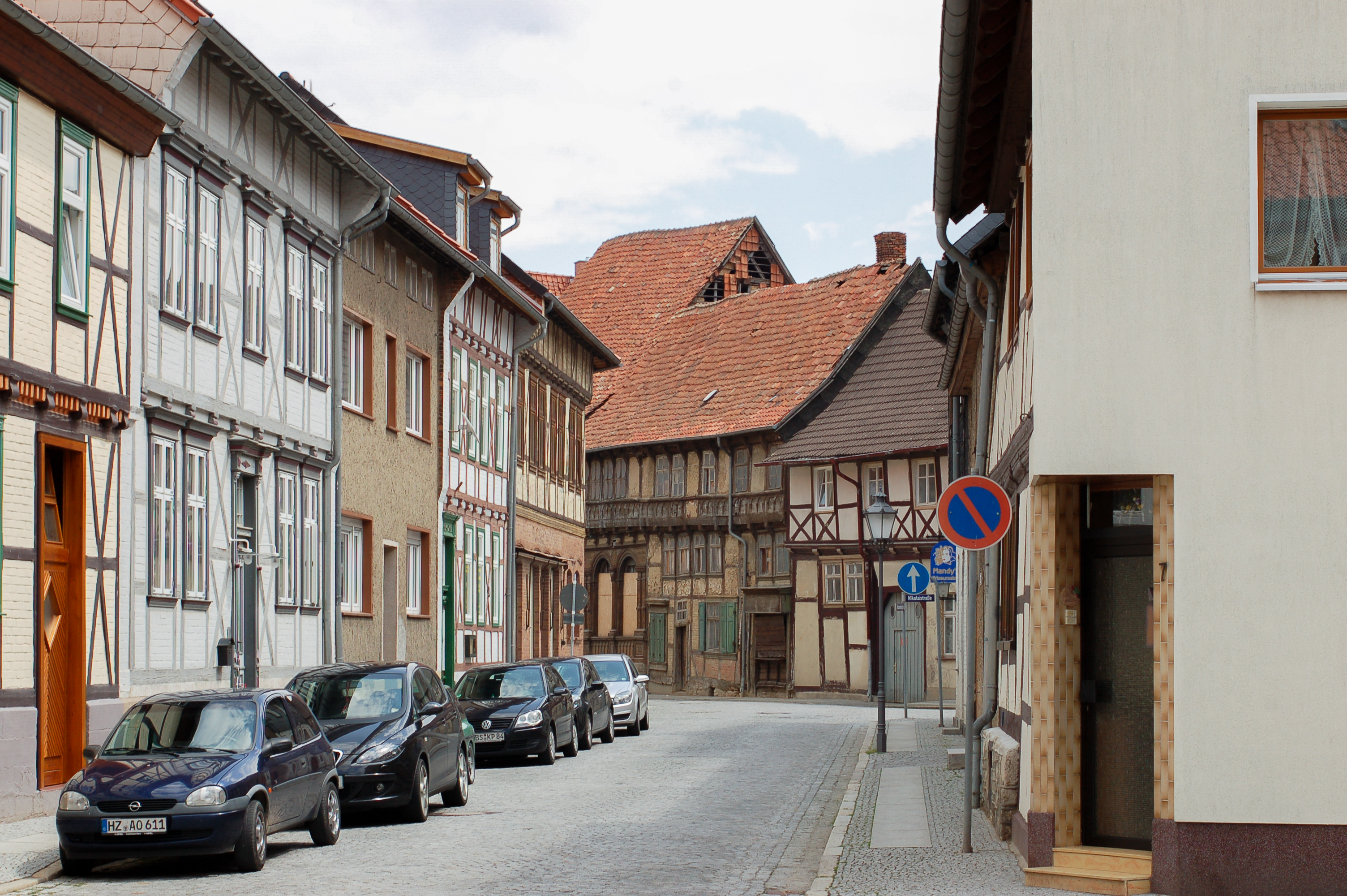 denkmalgeschützte Häuser in der Altstadt von Osterwieck